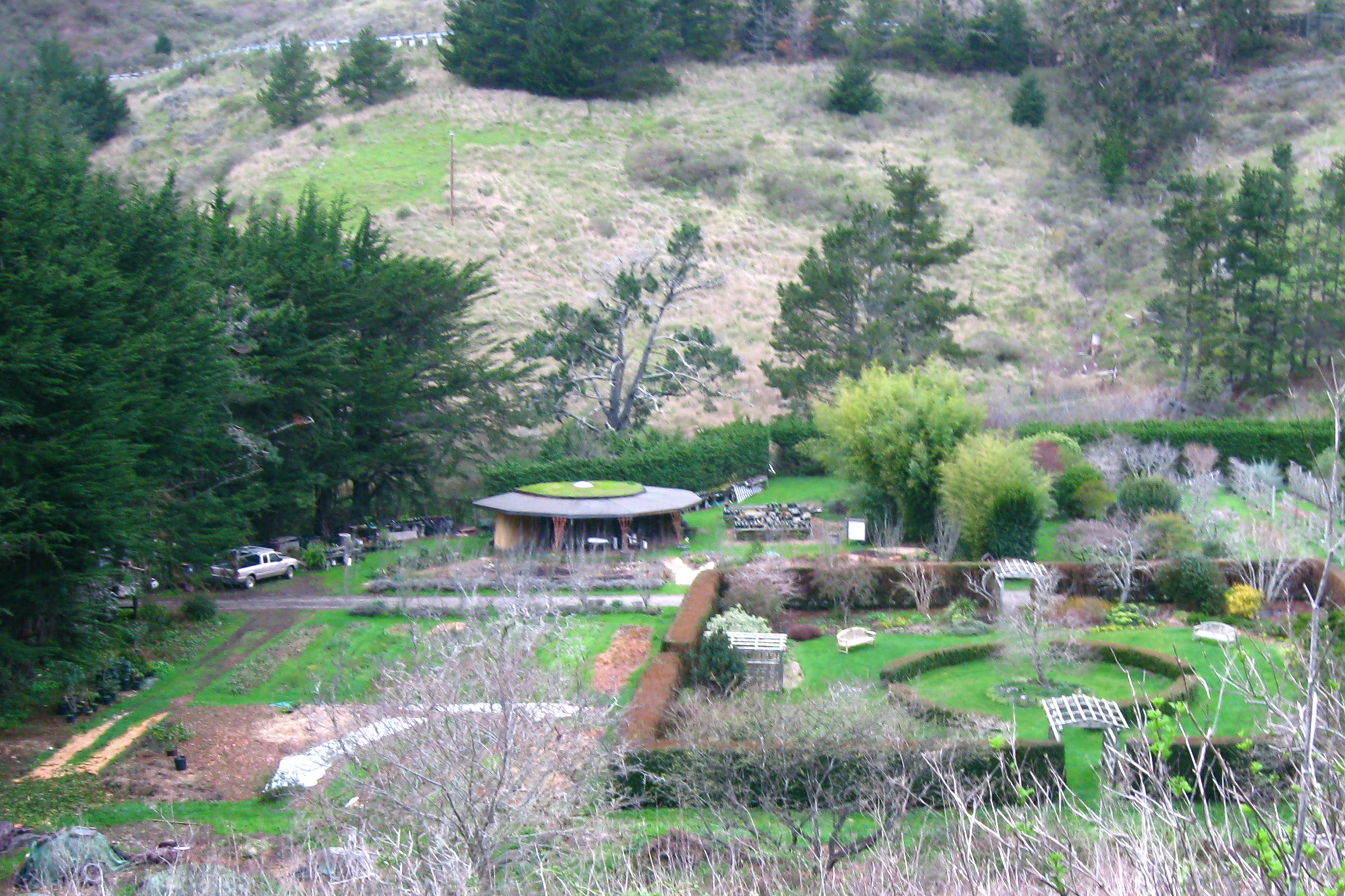 Green Gulch Farm Gardens